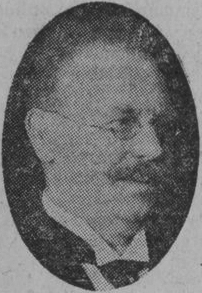 Hugo Rahm